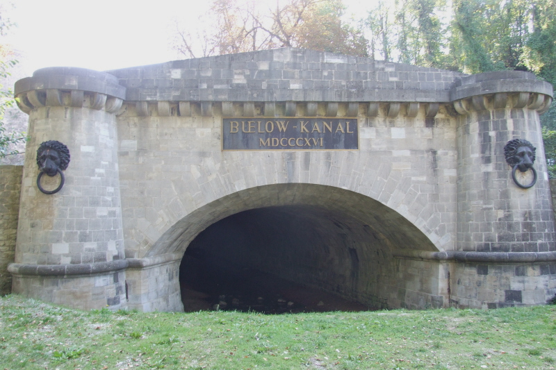 Museumspark Rüdersdorf: Tunnelmund des Bülowkanals Datum: 3. Oktober 2006 Höher aufgelöste Version ist verfügbar